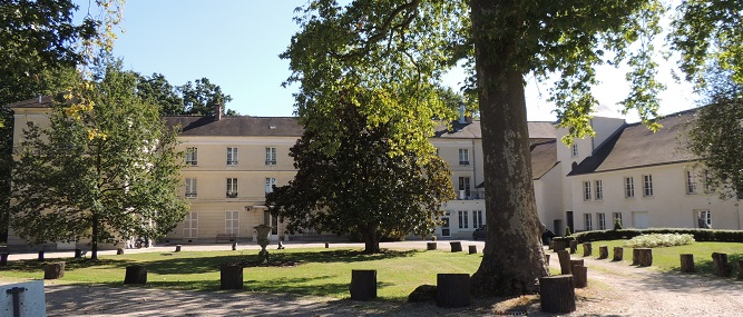 Demeure de la Cossonnerie ou Maison russe, le parc à l'entrée avec des déco et de grandes vasques et l'ancienne ferme reconvertie à l'arrière-plan.